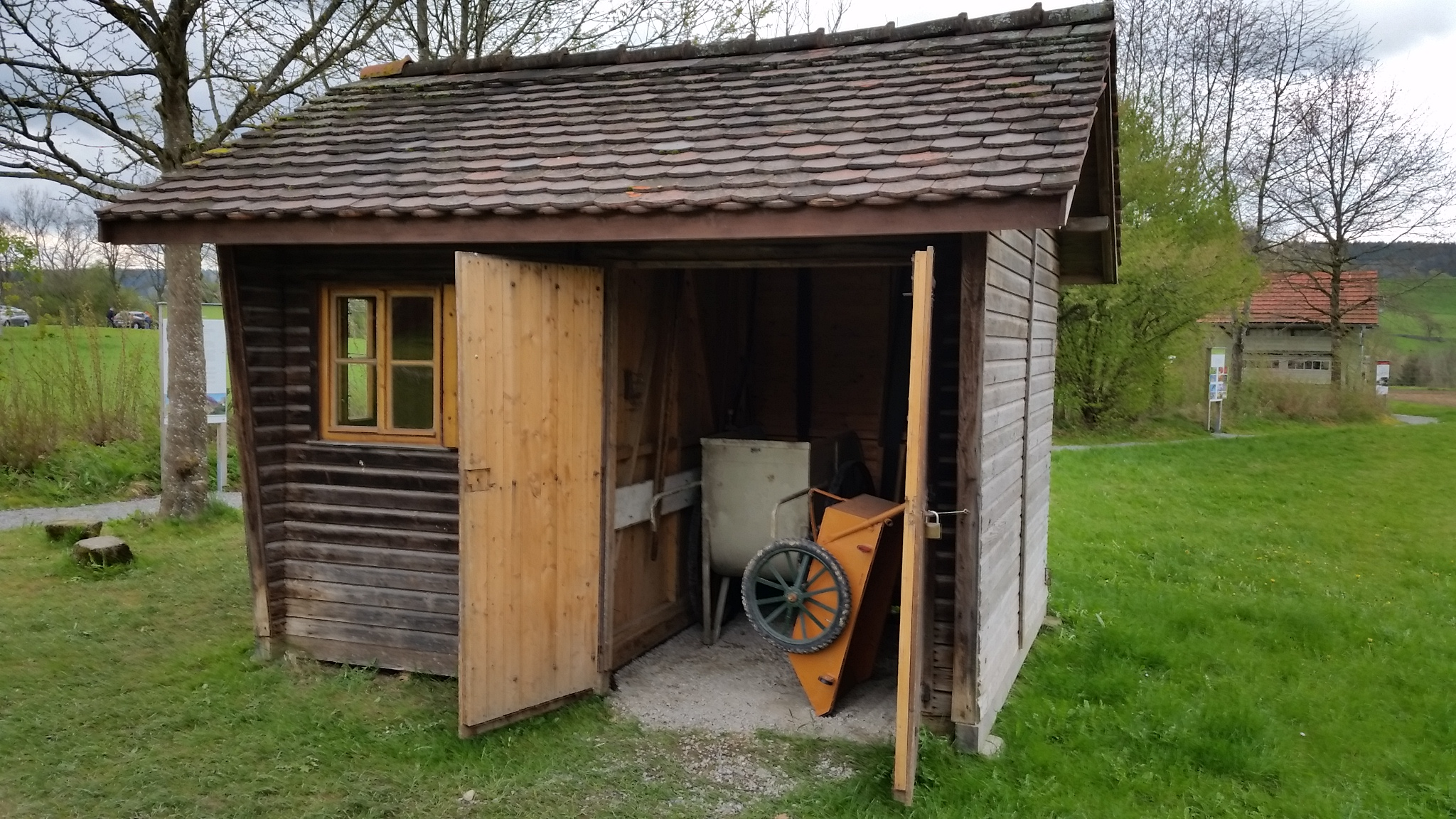 Straßenwärterhütte